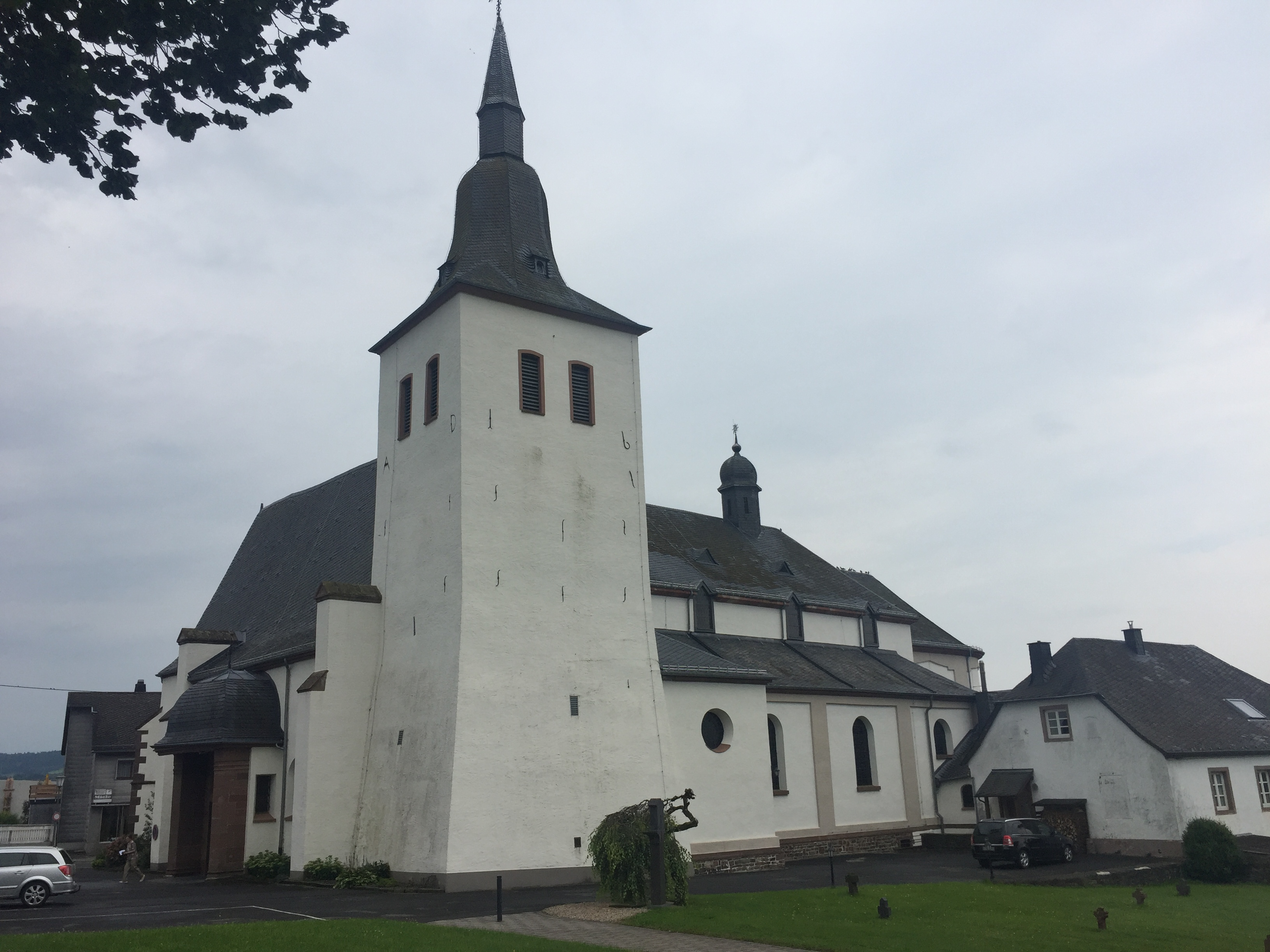 Iglesia en Bleialf